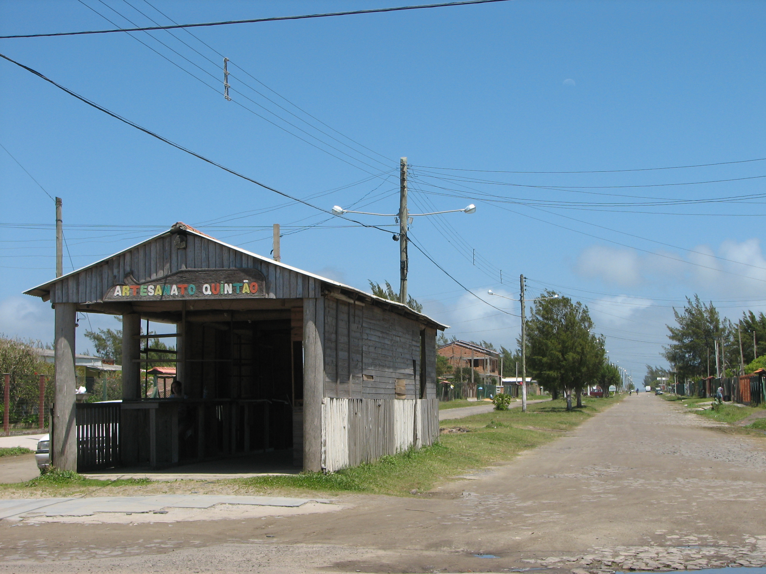 Avenida dos Bancários-Quintão